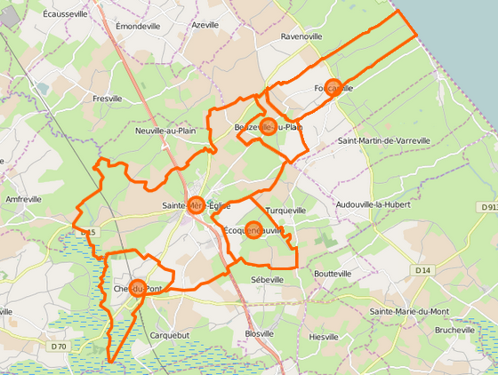 Carte de la commune nouvelle avec ses communes déléguées